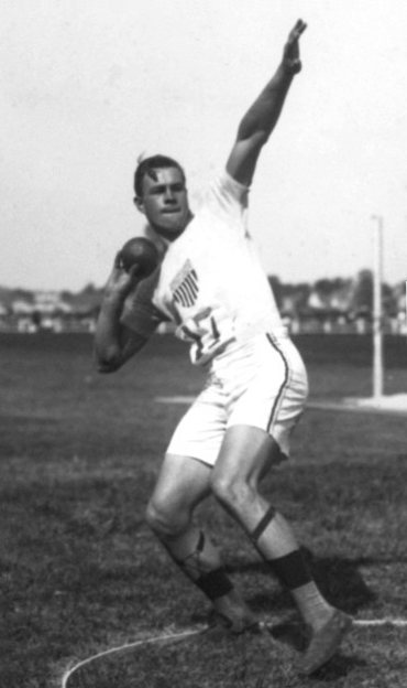 [Arthur] Dearborn (Américain) dans le lancement du poids [2 août 1908, meeting international d'athlétisme, à Colombes] : [photographie de presse] / [Agence Rol]